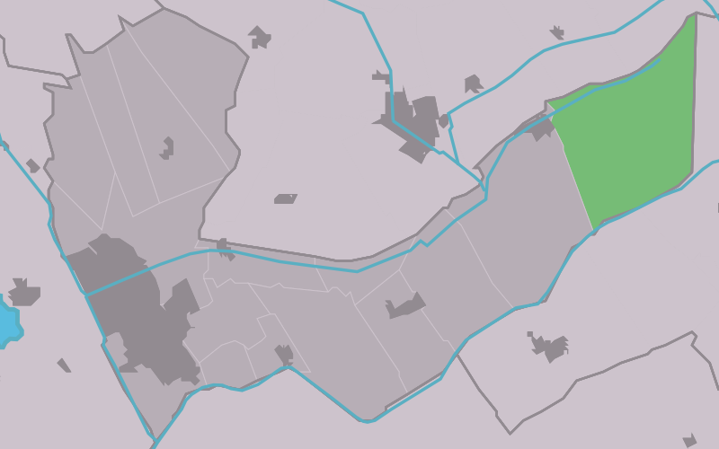 Kaartsje fan himrik fan Hoarnstersweach